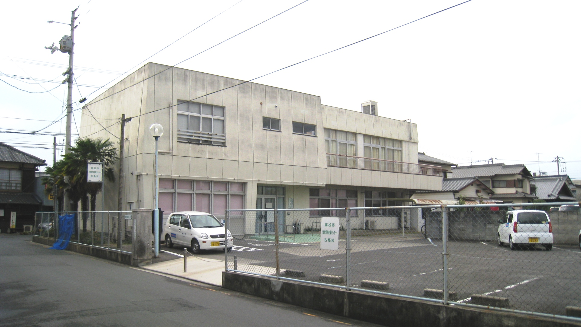 香川県にある高松市地域包括支援センター。旧高松市古高松出張所。